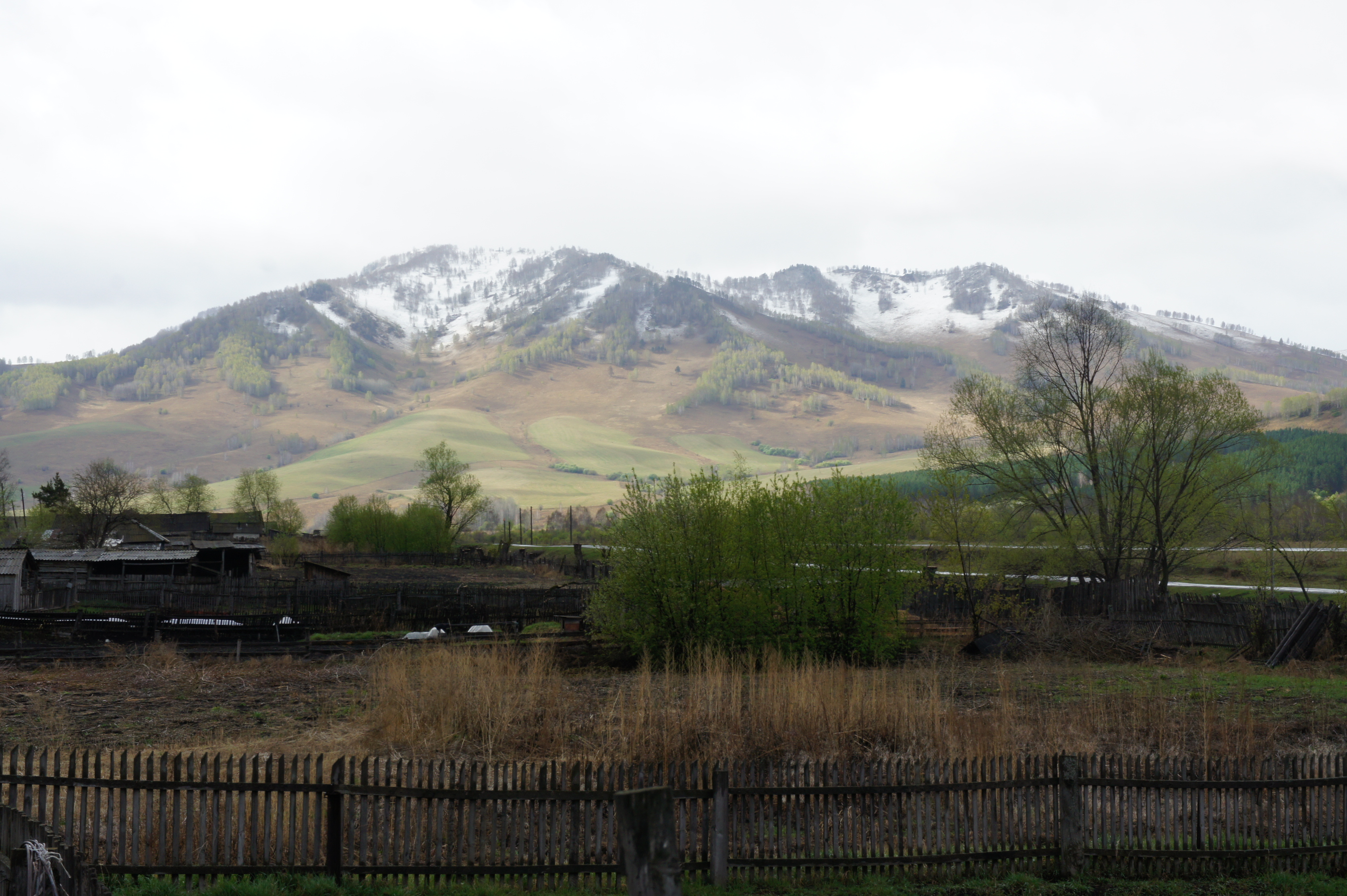 с. Солонешное, начало мая. Высотная поясность